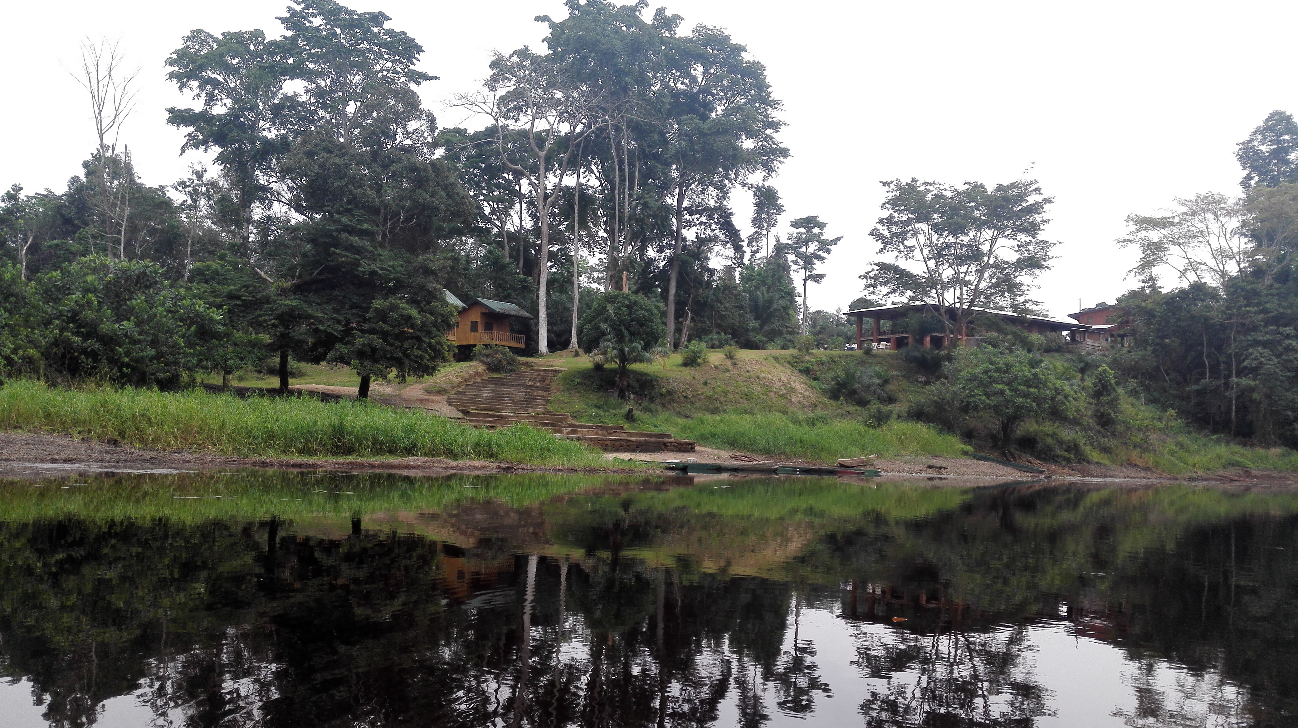 Site écotouristique d'Ebogo,Mefou - Et- Akono, Région du Centre, Cameroun.